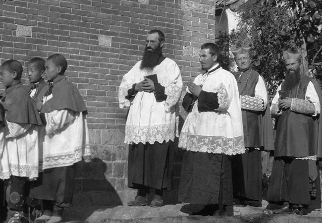 Mgr Conforti (1865-1931) en Chine en 1928.